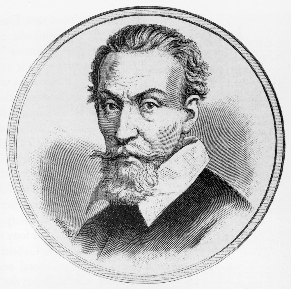 Claudio Monteverdi (1567-1643)